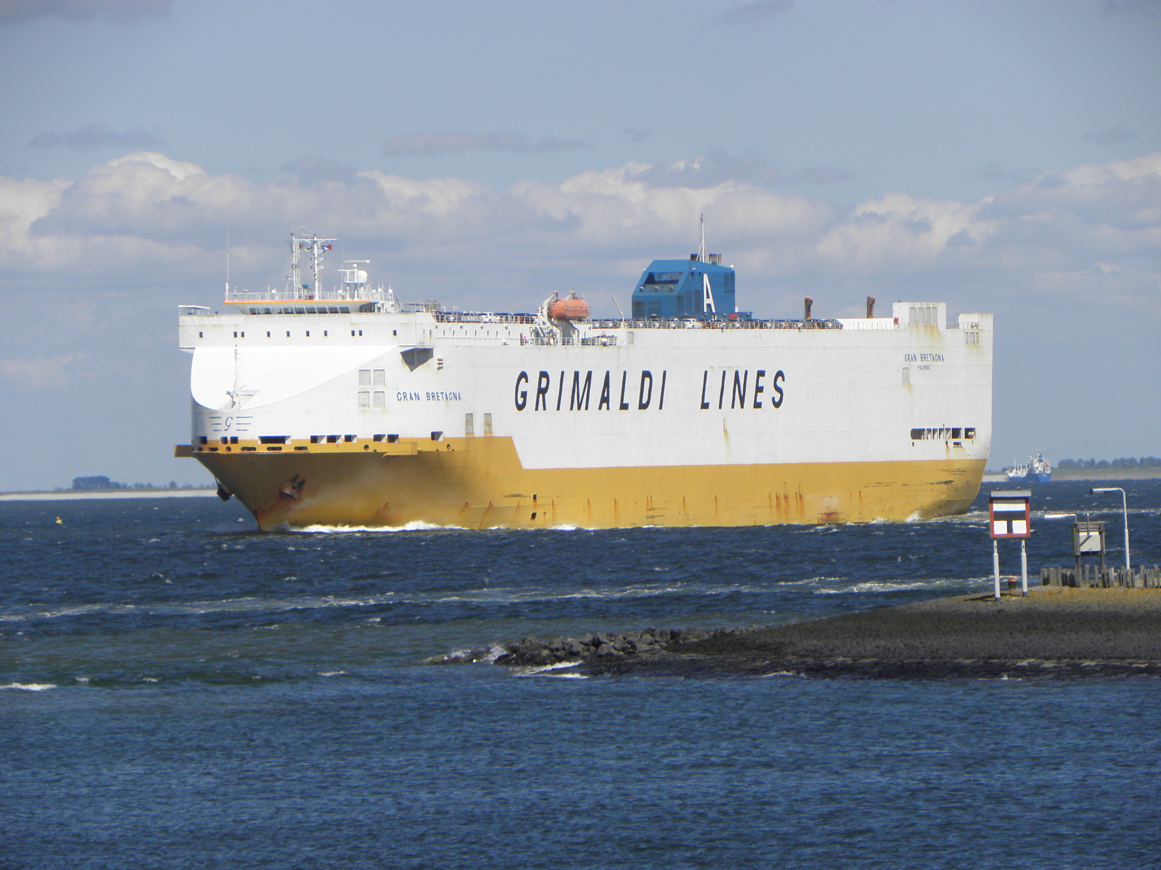 Gran bretagna I.M.O. number 9143702